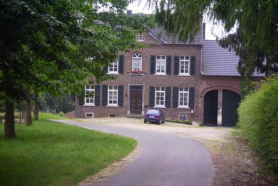 Summary Bildbeschreibung: Haberger Hof bei Erkelenz-Lövenich Quelle: eigenes Foto Fotograf/Zeichner: bodoklecksel 15:22, 15. Jun 2006 (CEST) Datum: Juni 2006 Sonstiges: ...